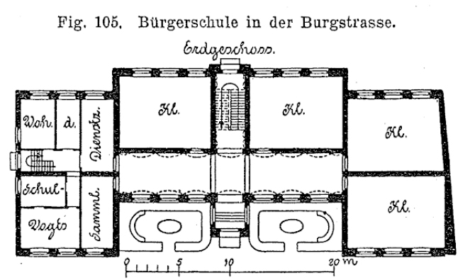 Grundrisszeichnung der 1890 bis 1893 von dem hannoverschen Stadt-Bauinspektor Paul Rowald errichteten Bürgerschule in der Burgstraße 22 in Hannover